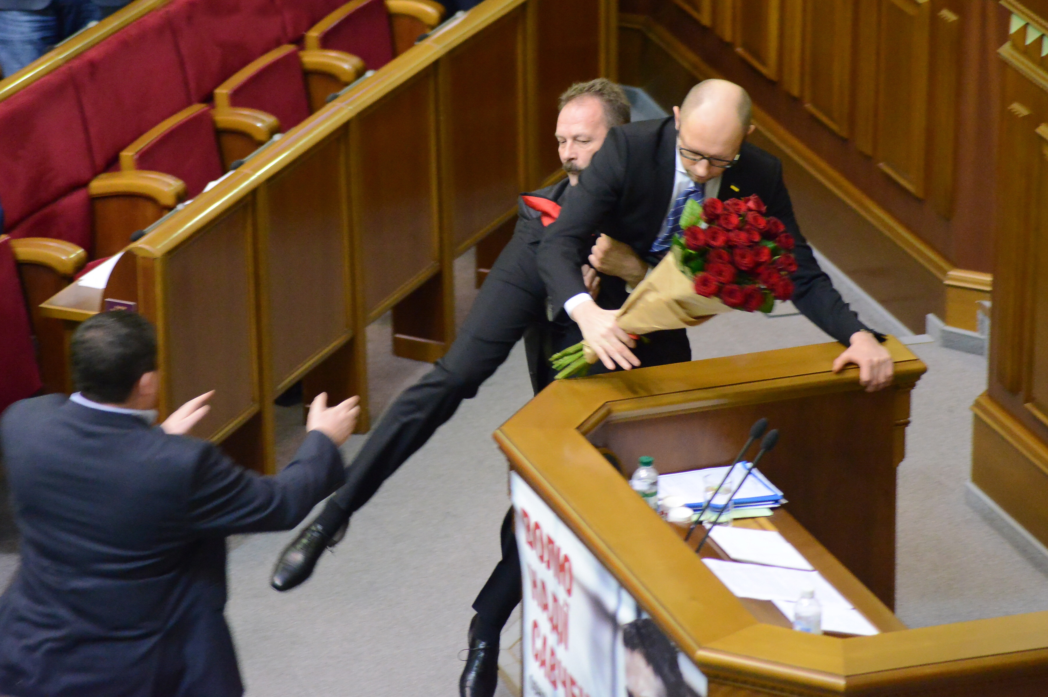 ВЕРХОВНА РАДА УКРАЇНИ 2015 , фото Вадим Чуприна